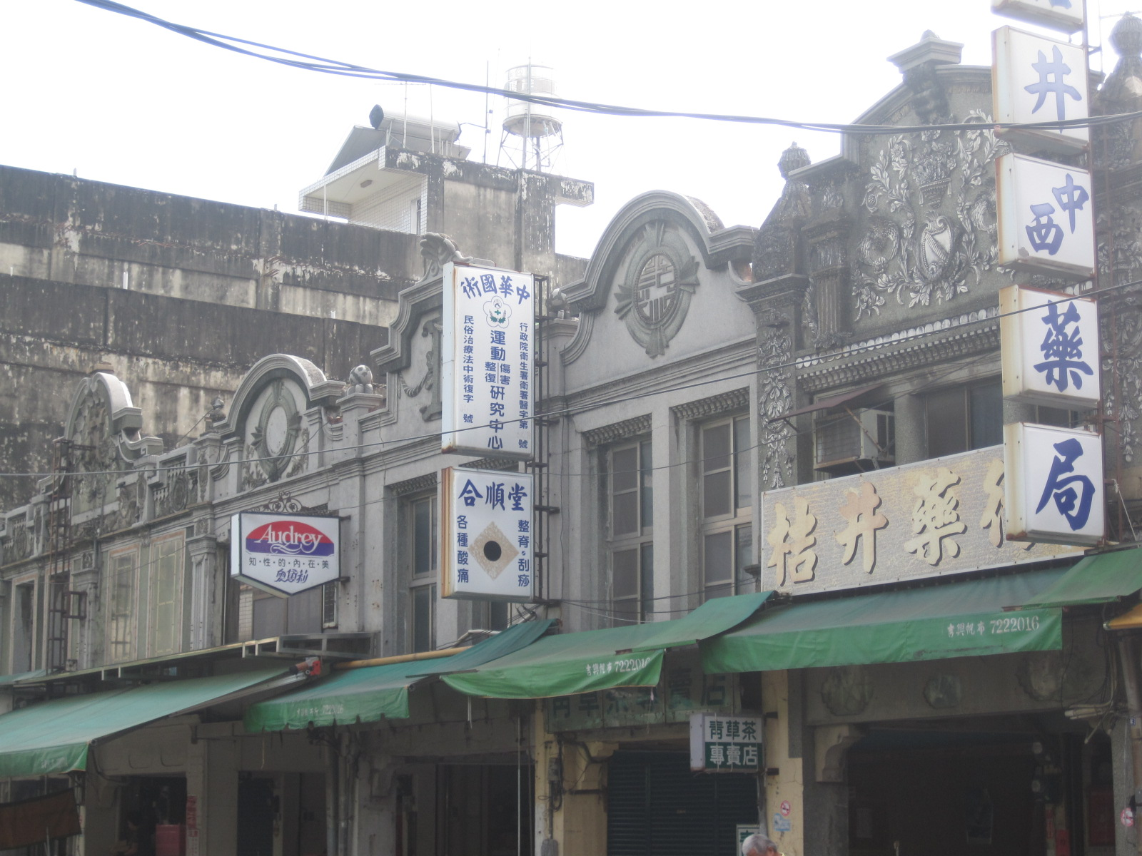 佳里金唐殿旁的老街屋